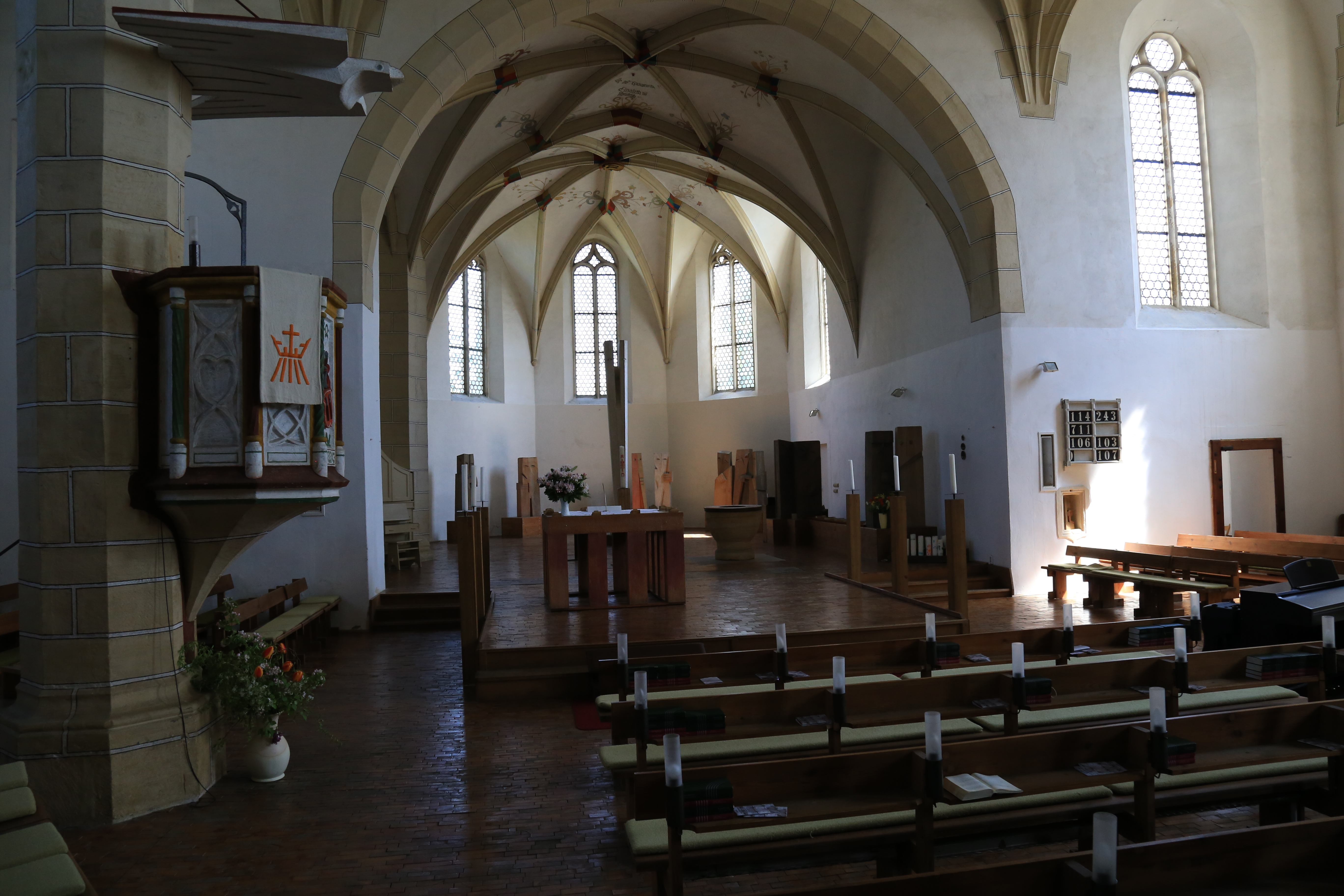 Göda Kirche April 2017 (13) Hornjoserbsce: Ewangelska cyrkej swjateju Pětra a Pawoła w Hodźiju